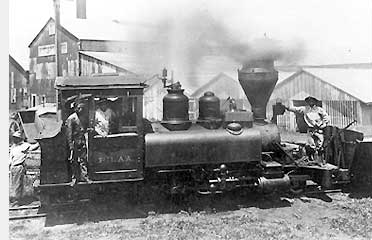 Locomotive 'Pilaa' on mill yard of Kilauea Sugar Co. in 1895 (probably Dale W. Anderson Collection)